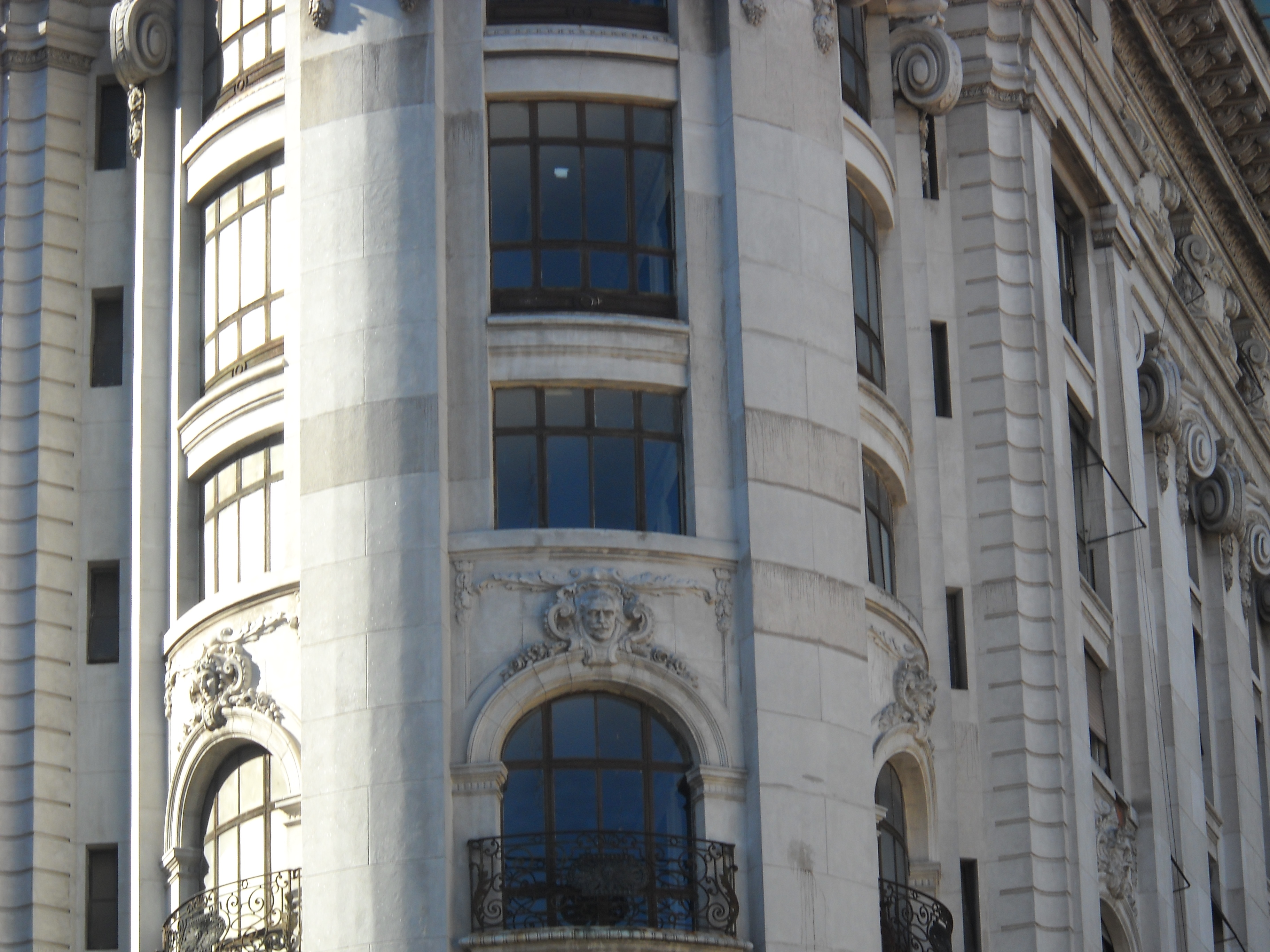 Fotografia Digital, del "Edificio Banco Argentino Uruguayo", en donde se aprecia la parte superior de la Ochava, la cual posee el rostro del Aquitecto "Eduardo Le Monnier".